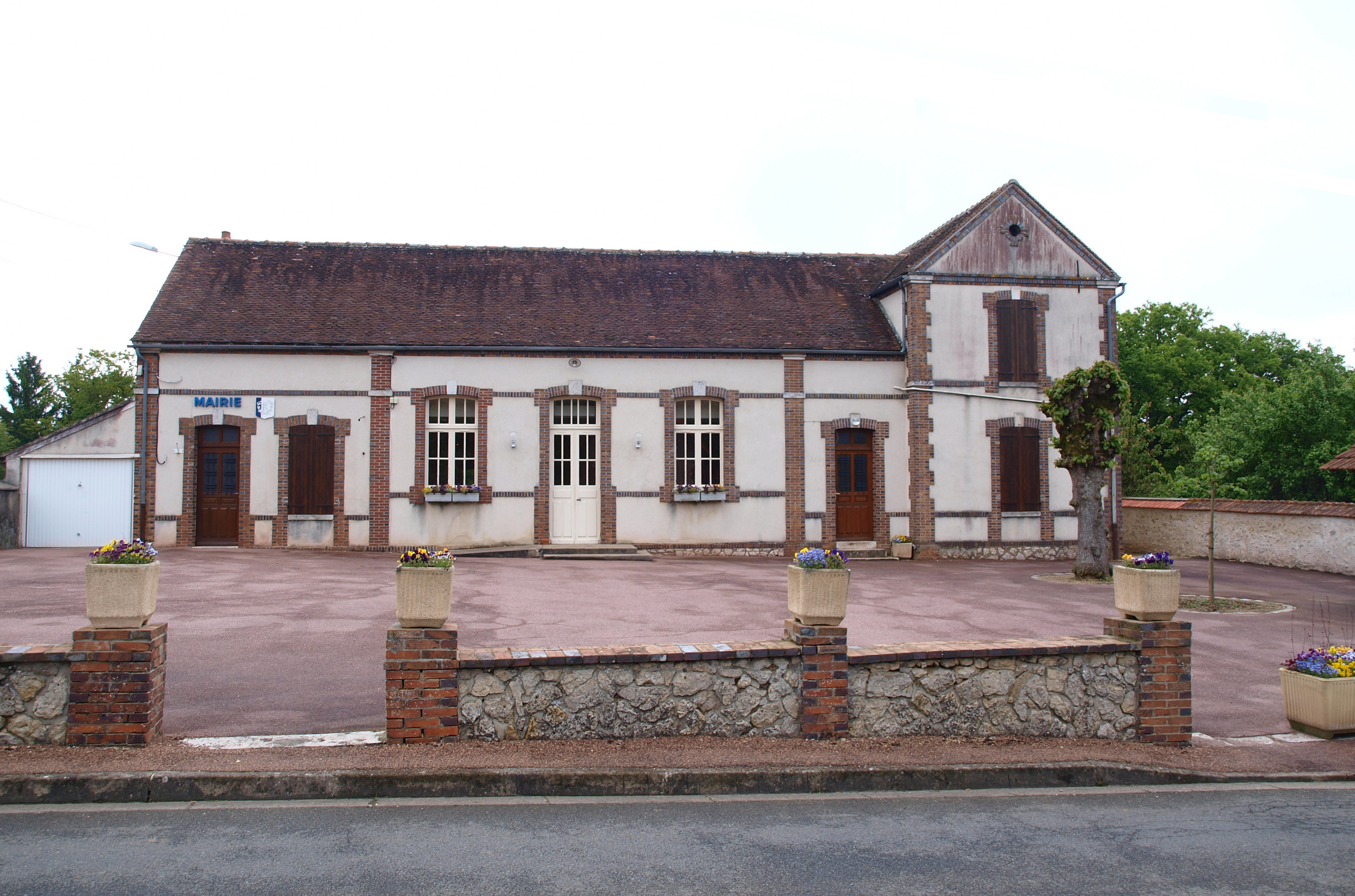 Pers-en-Gâtinais (Loiret, France) , la mairie.